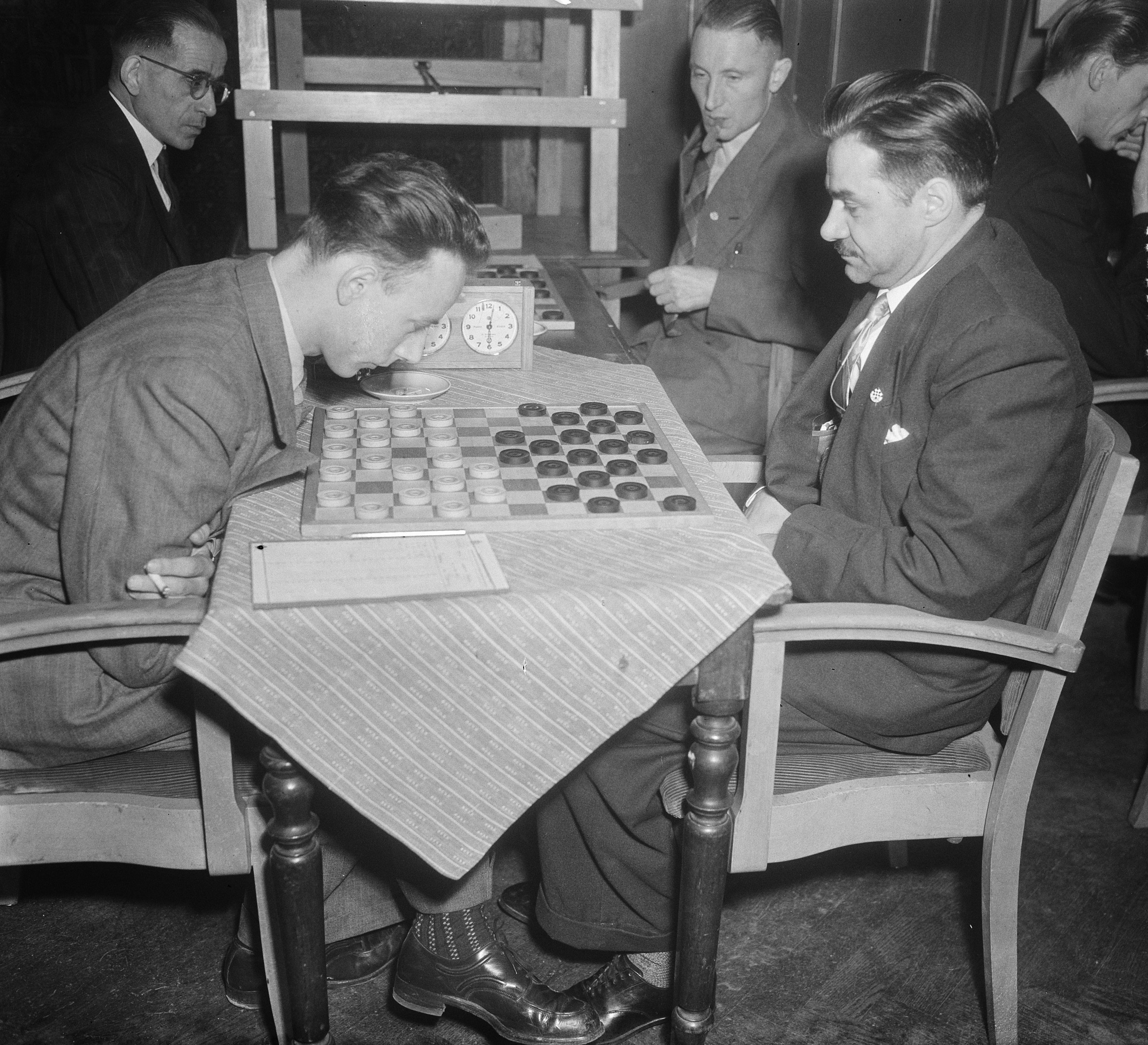 Collectie / Archief : Fotocollectie Anefo Reportage / Serie : [ onbekend ] Beschrijving : Wereldkampioenschappen Dammen Nijmegen. Rosenburg tegen Degenais Datum : 12 november 1952 Locatie : Nijmegen Trefwoorden : DAMMEN, wereldkampioenschappen Fotograaf : Pot, Harry / Anefo Auteursrechthebbende : Nationaal Archief Materiaalsoort : Glasnegatief Nummer archiefinventaris : bekijk toegang 2.24.01.09 Bestanddeelnummer : 905-4117